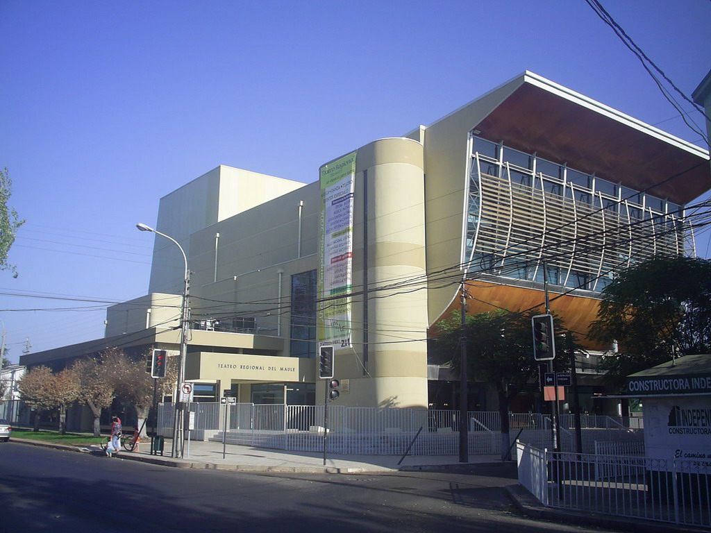 Teatro Regional del Maule.